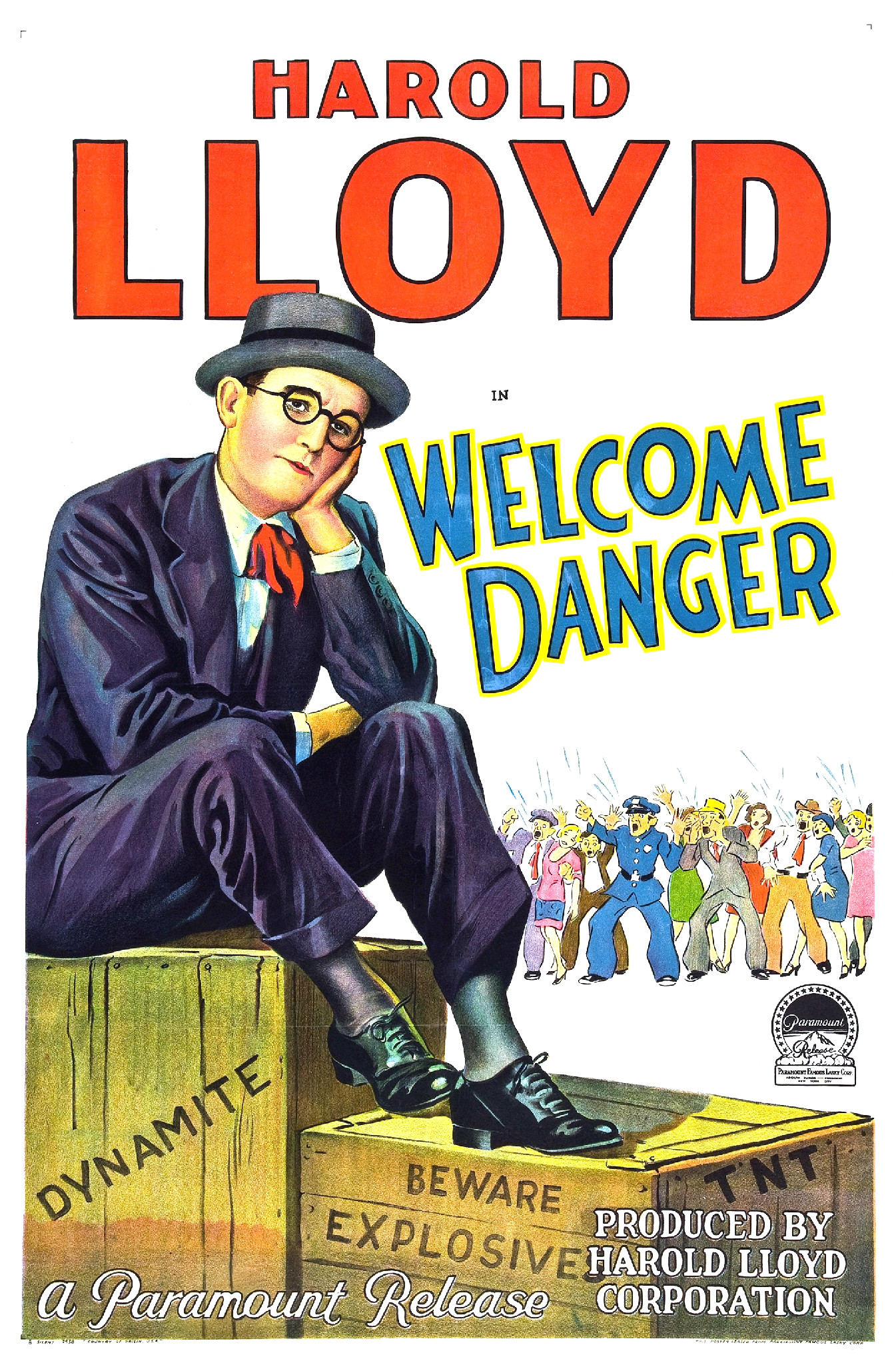 Poster for the 1929 film Welcome Danger.